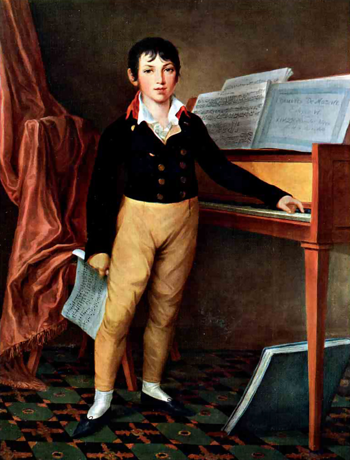 Giacomo Meyerbeer à l'âge de 11 ans